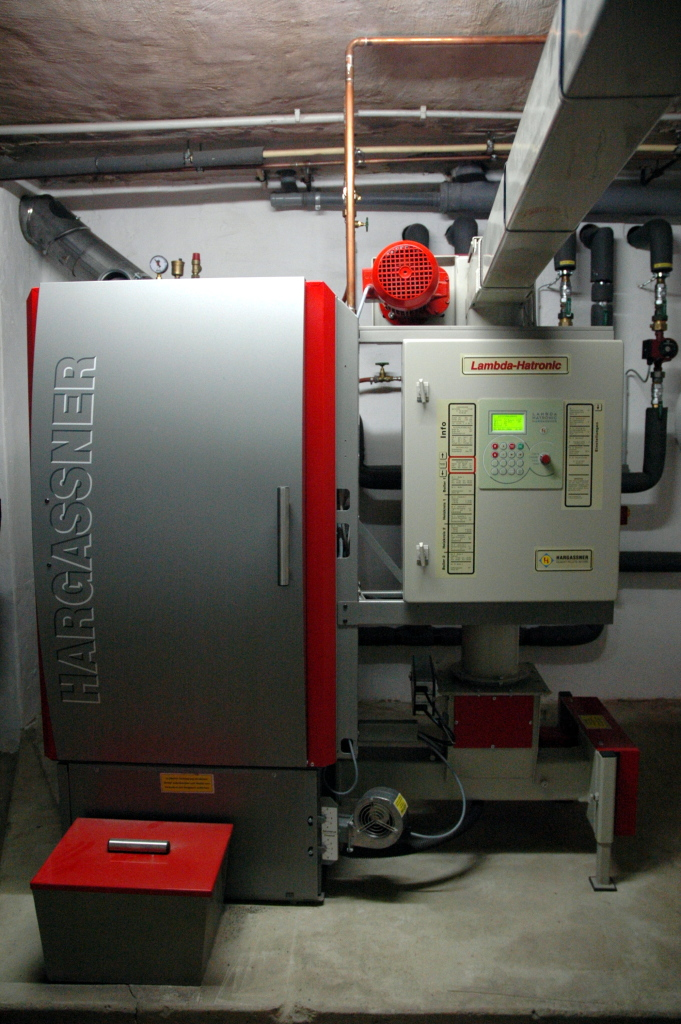 Holzhackschnitzelheizung der Firma Hargassner